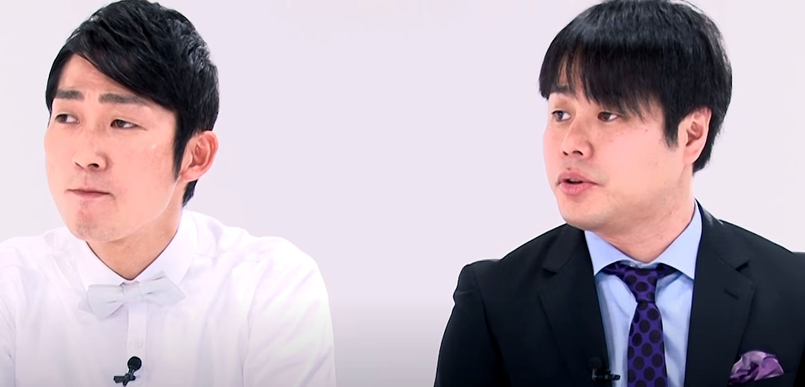 NON STYLE（ノンスタイル）